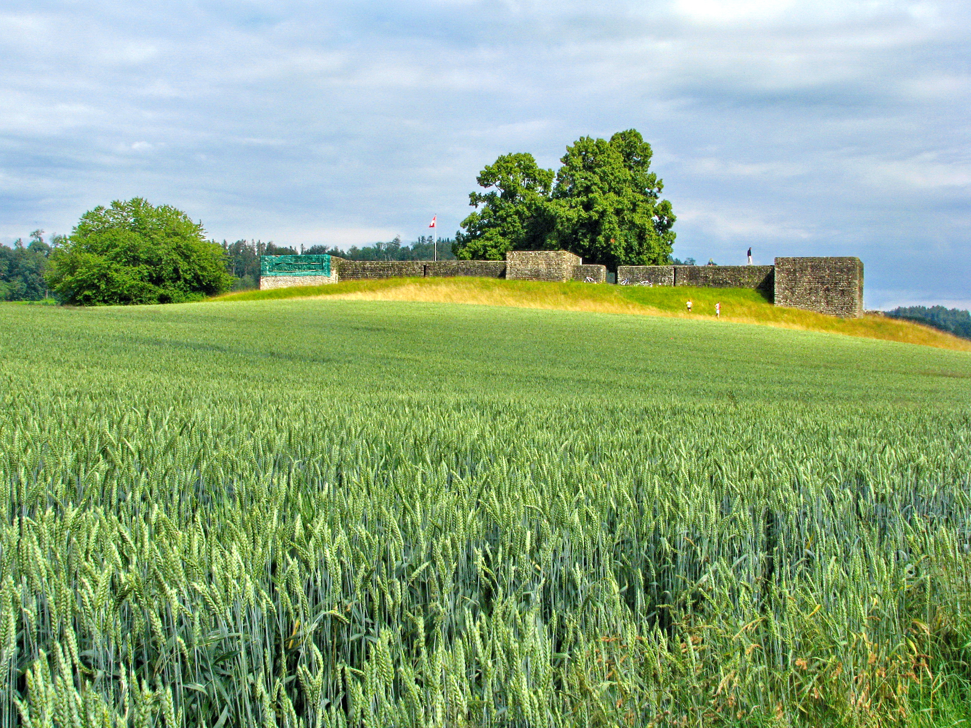 Römisches Kastell in Irgenhausen (Pfäffikon), Ansicht von Nordwesten